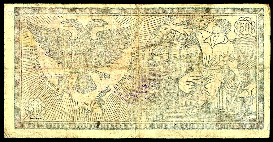 Банкнота номиналом 50 рублей, выпущенная Центросибирью, реверс.